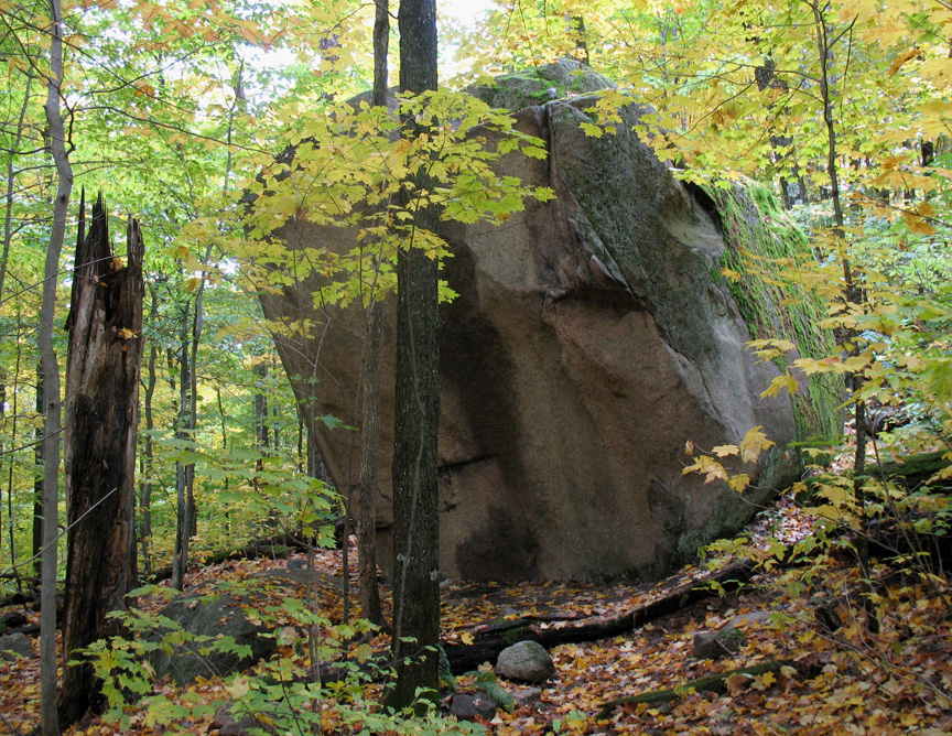 Forêt ancienne du Mont Wright, parc public de promenade et d'escalade à Stoneham-et-Tewkesbury au nord de la ville Québec dans région administrative de la Capitale-Nationale. Province de Québec, Canada.